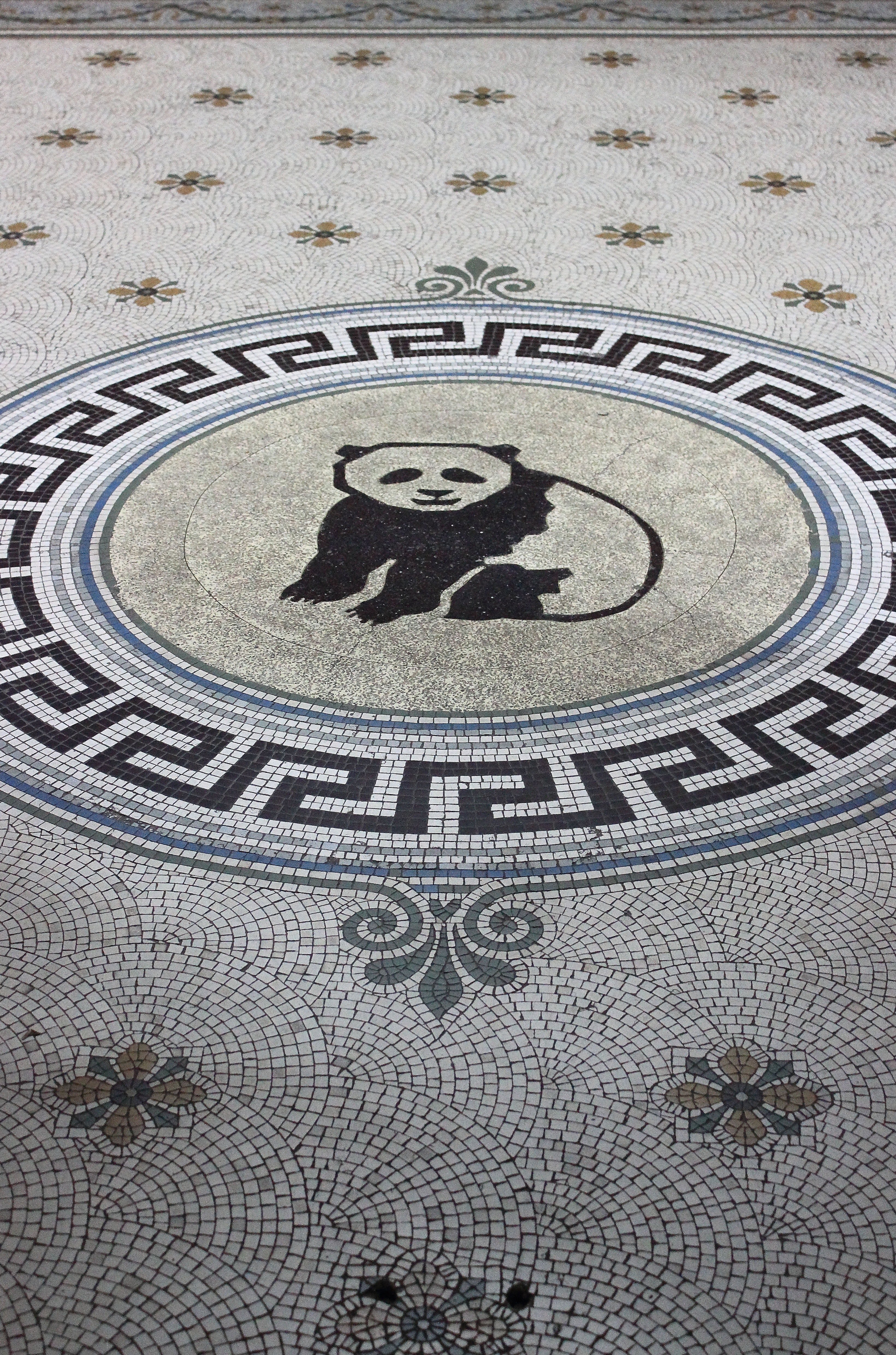 中文（中国大陆）: 华商纱布交易所的熊猫地坪